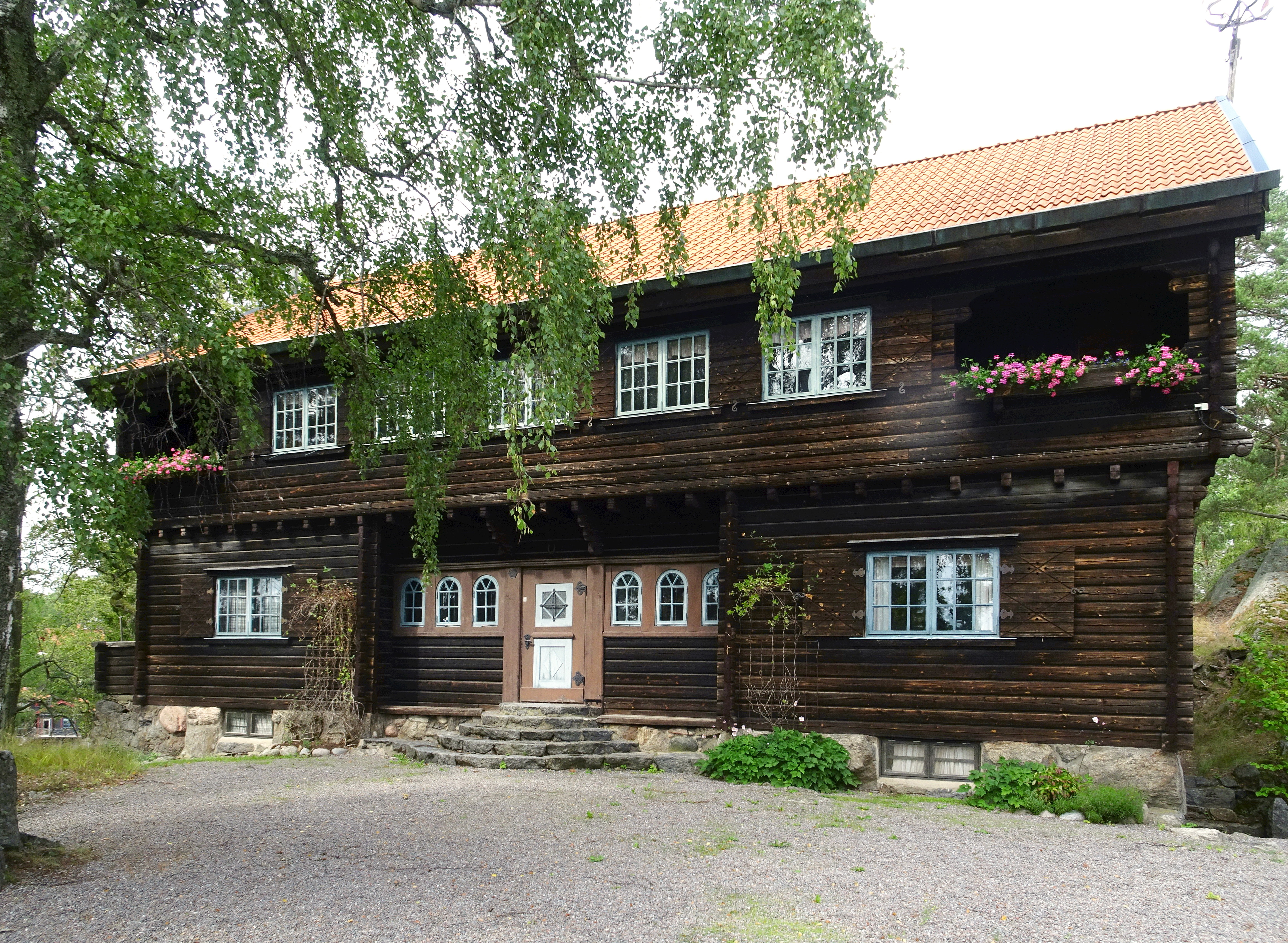 Föreningen Kulturella folkdansgillets föreningsstuga i Solsäter, Bollmora, Tyresö kommun